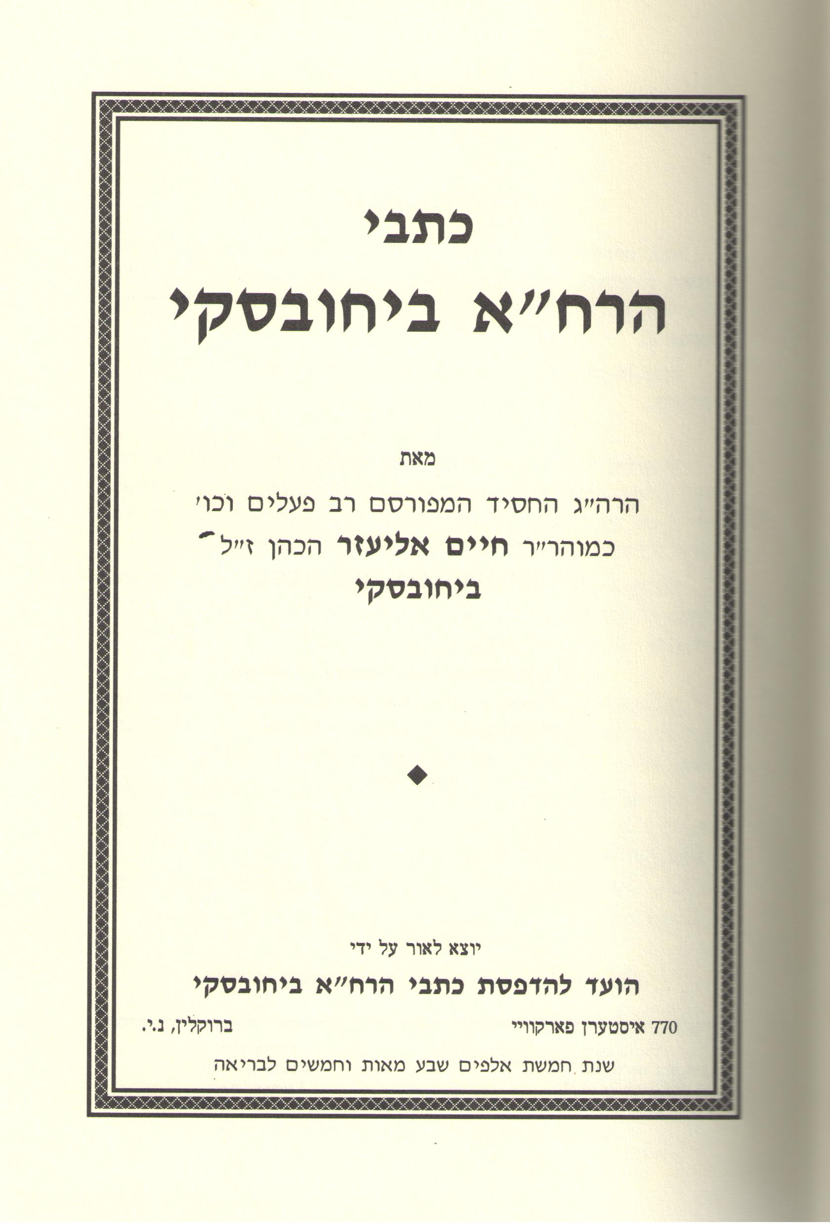 שער הספר כתבי הרח"א ביחובסקי